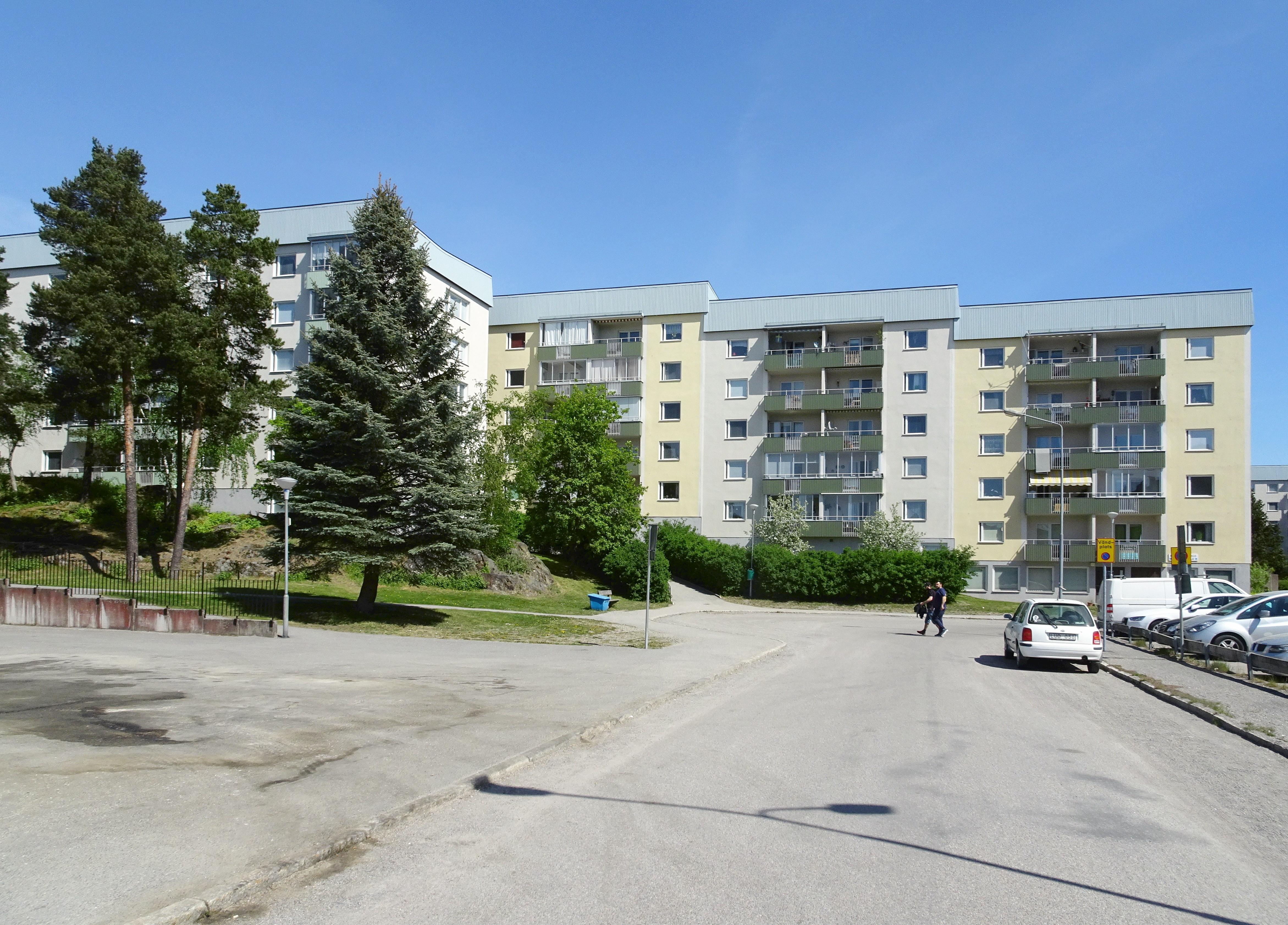 Visättra, Huddinge kommun (Sågstuvägen)